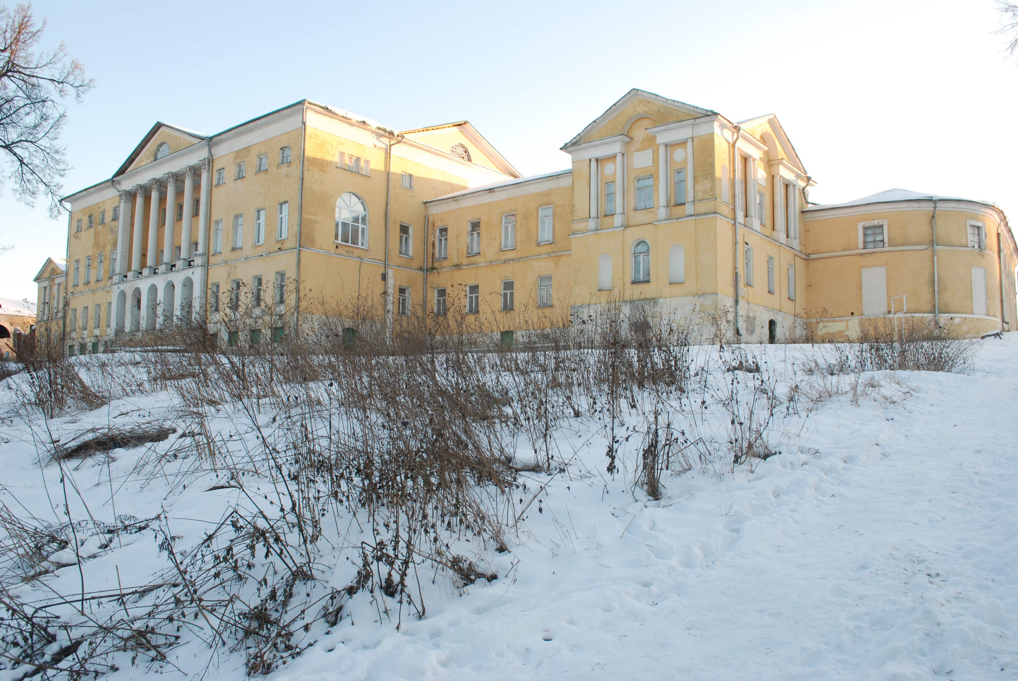 Главный дом с флигелями (Москва и Московская область, Подольск, посёлок Володарского (село Ивановское, Парковая улица, 1))